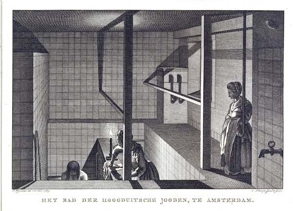 Prent van een ritueel bad. Onderschrift: Het Bad Der Hoogduitsche Jooden, Te Amsterdam.